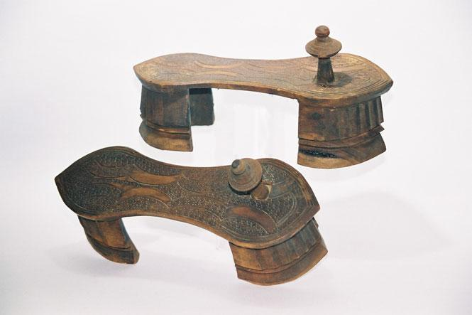 Paduka stilted toe-knob sandal.